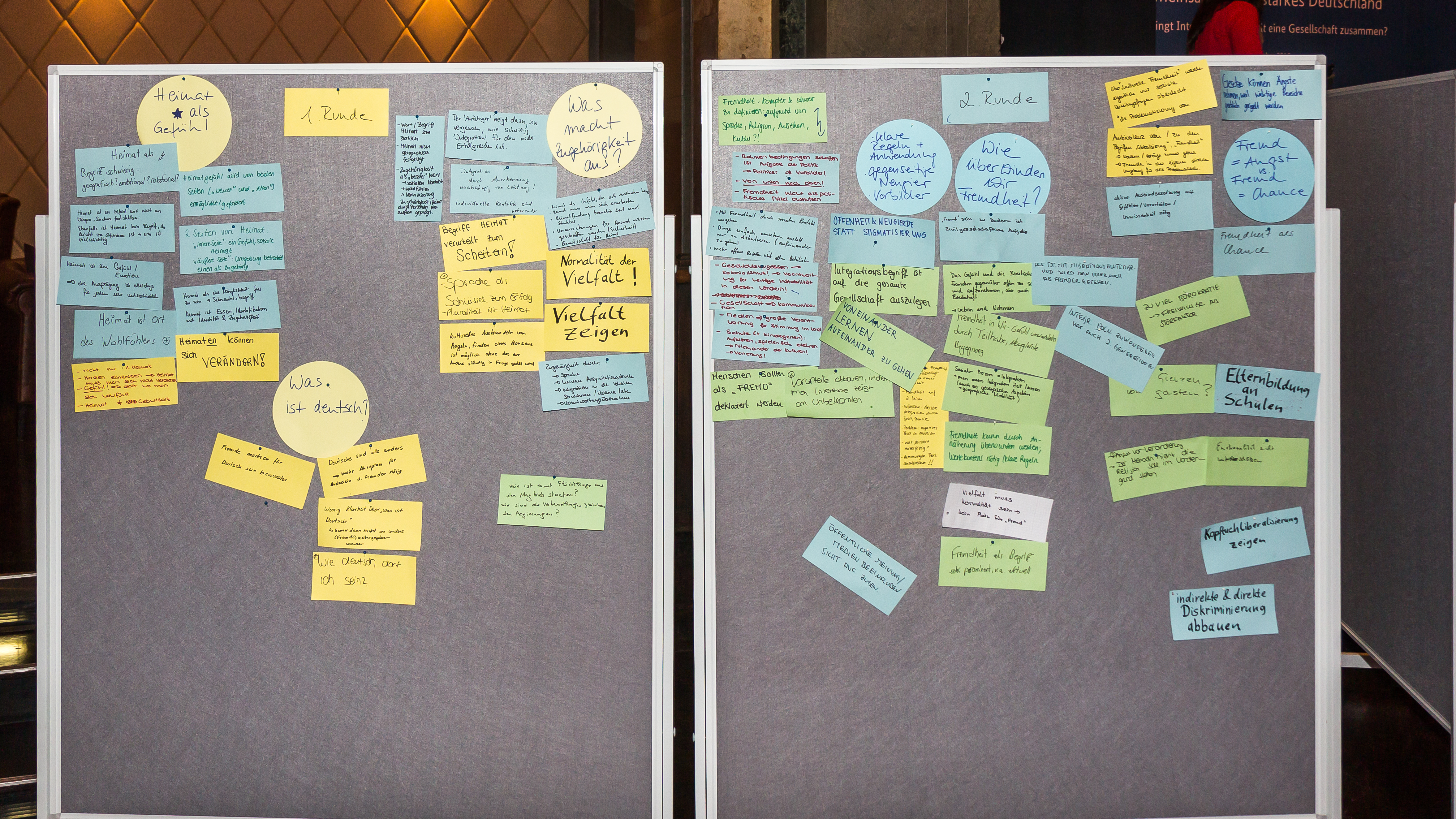 Werkstattreihe #gemeinsam für ein starkes Deutschland. Wie gelingt Integration? Wie hält eine Gesellschaft zusammen? Veranstalter: Bundesministerium des Innern. Veranstaltungsort: Alter Wartesaal Köln Foto: Workshopphase im World-Café-Stil